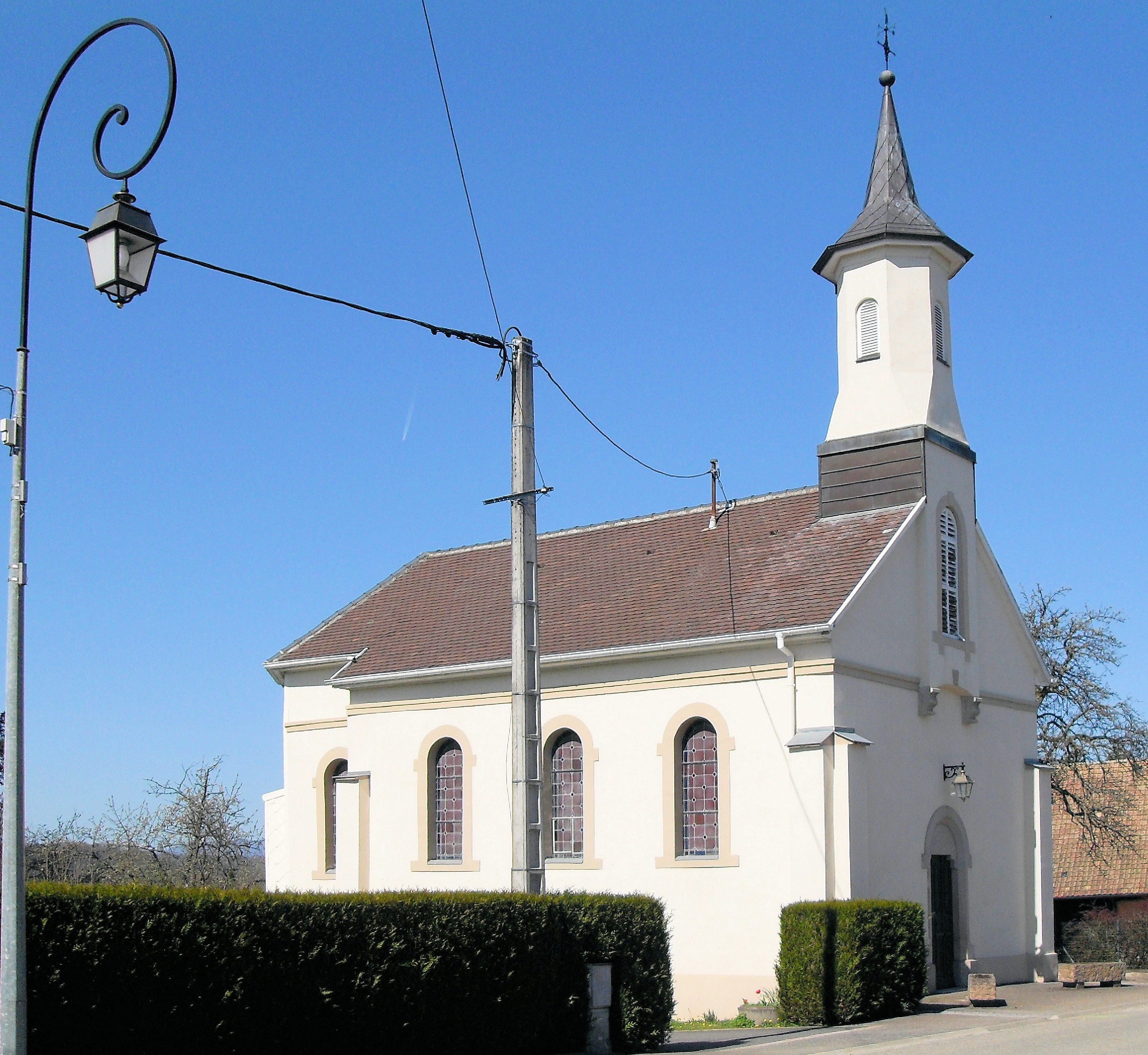 La chapelle Sainte-Apolline à Guevenatten